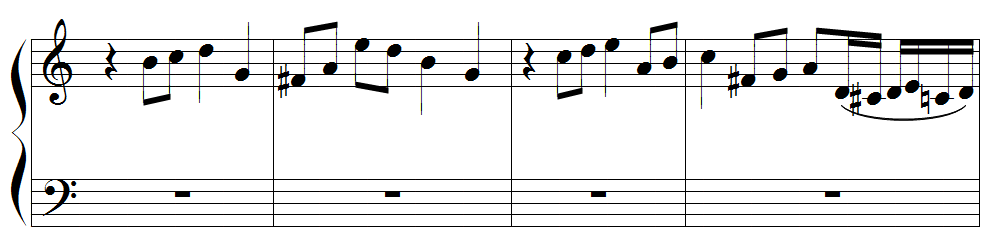 Anton Reicha - second sujet de la fugue n°31 des 36 fugues, op.36